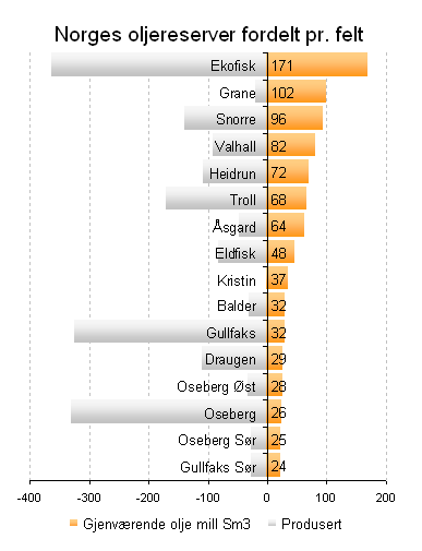 Petroleumsvirksomhet i Norge: Solpediagram: Norske utvinnbare oljereserver fordelt pr felt. Basert på offentliggjorte tall fra Oljedirektoratet pr 8. mars 2006. Indikator for hva som er gjenværende i hvert felt.